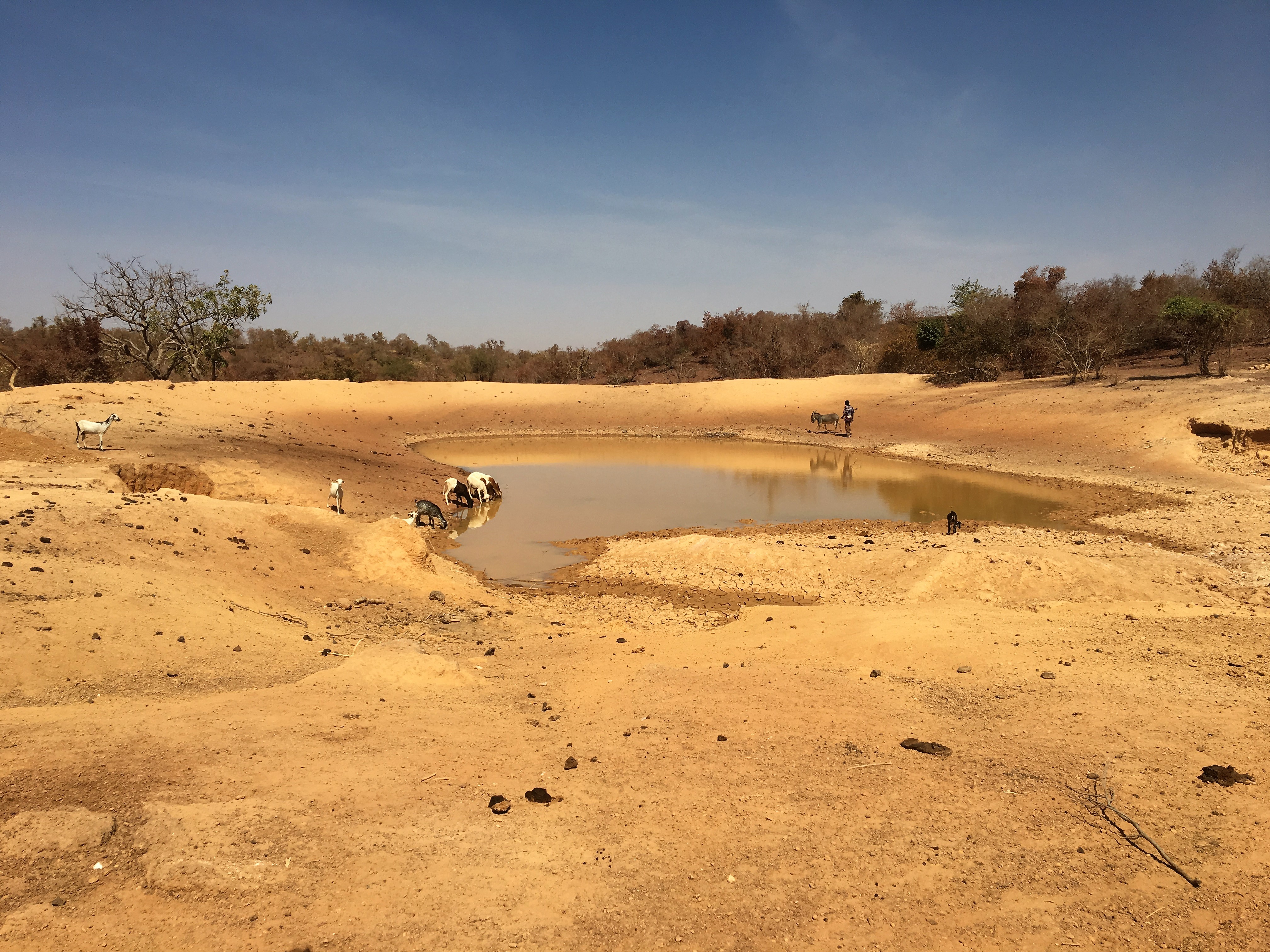 Bouli de Rambo-Watinooma